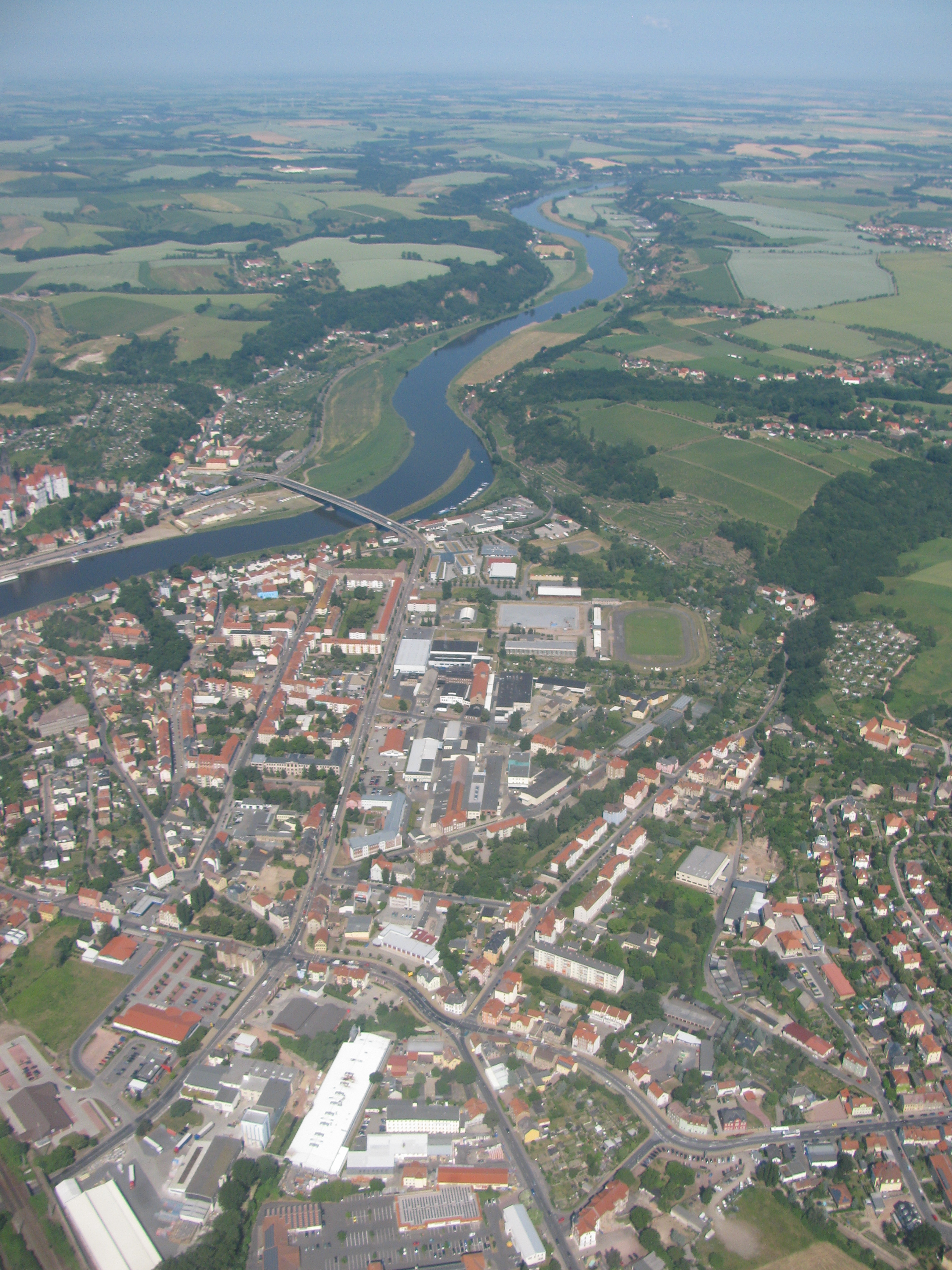 Luftbild Meißen-Niederfähre